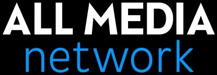 Логотип компании All Media Network